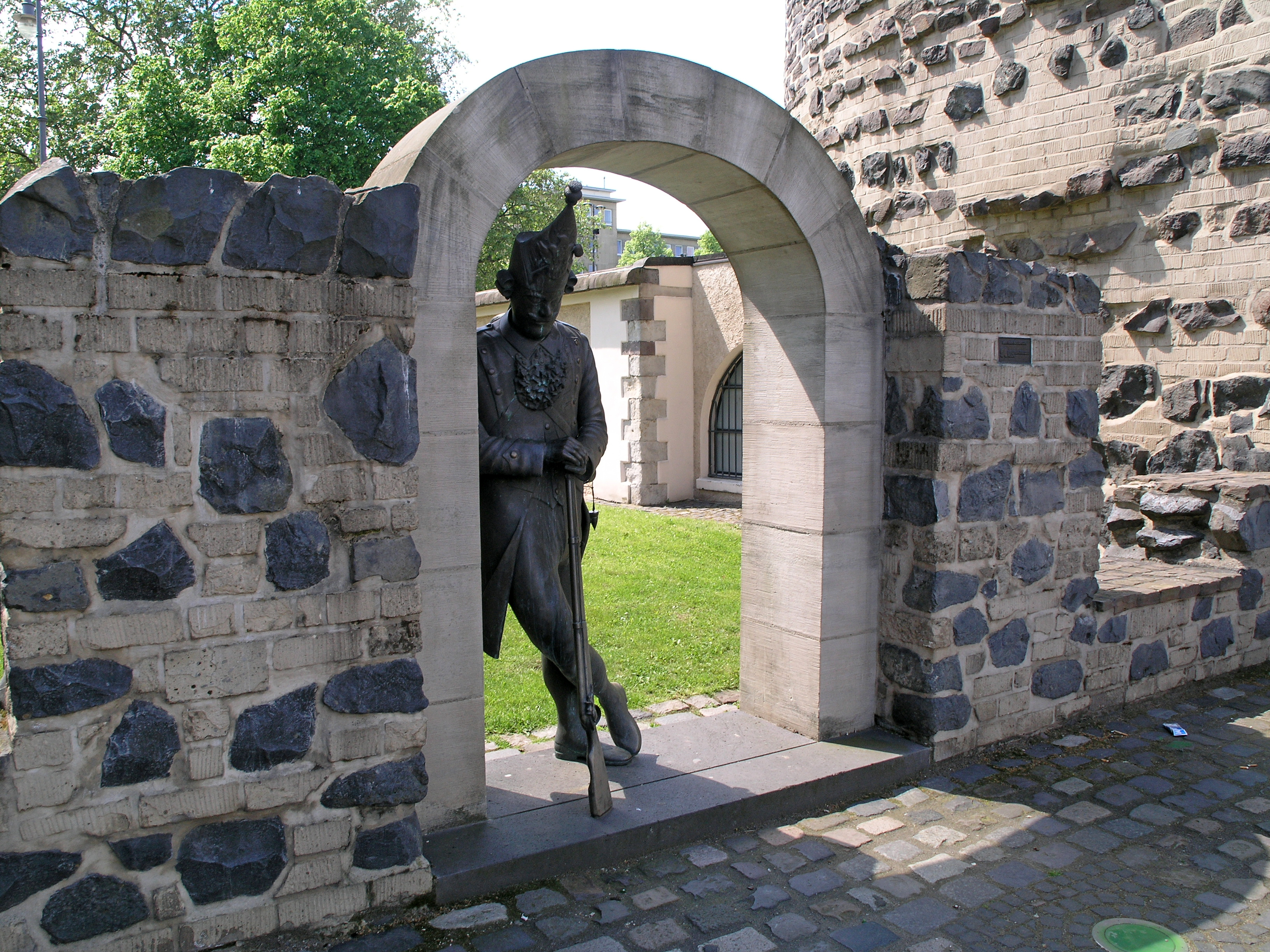 Северный Рейн-Вестфалия, Кёльн - Улрепфорт